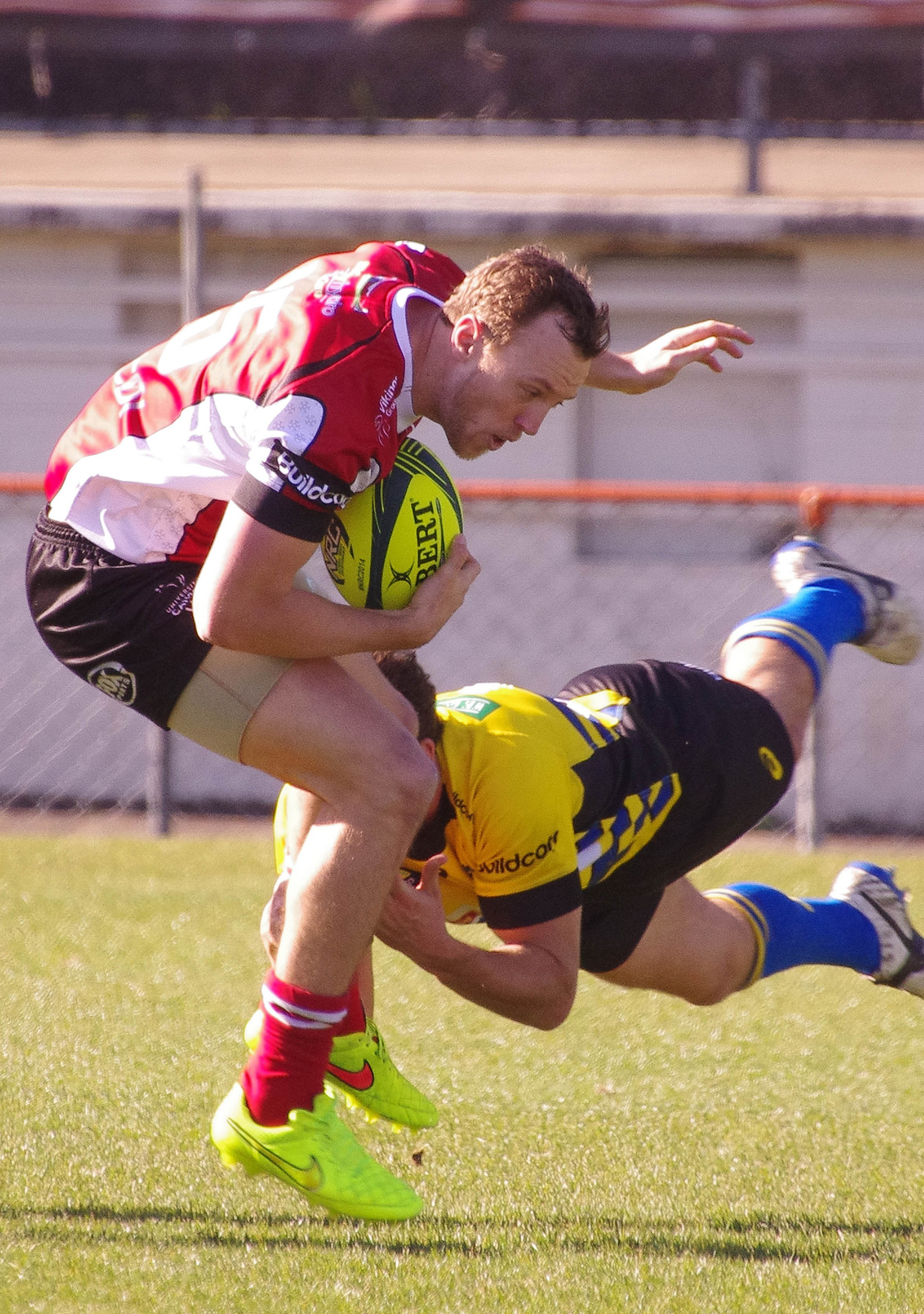 Jesse Mogg (2014), crop.